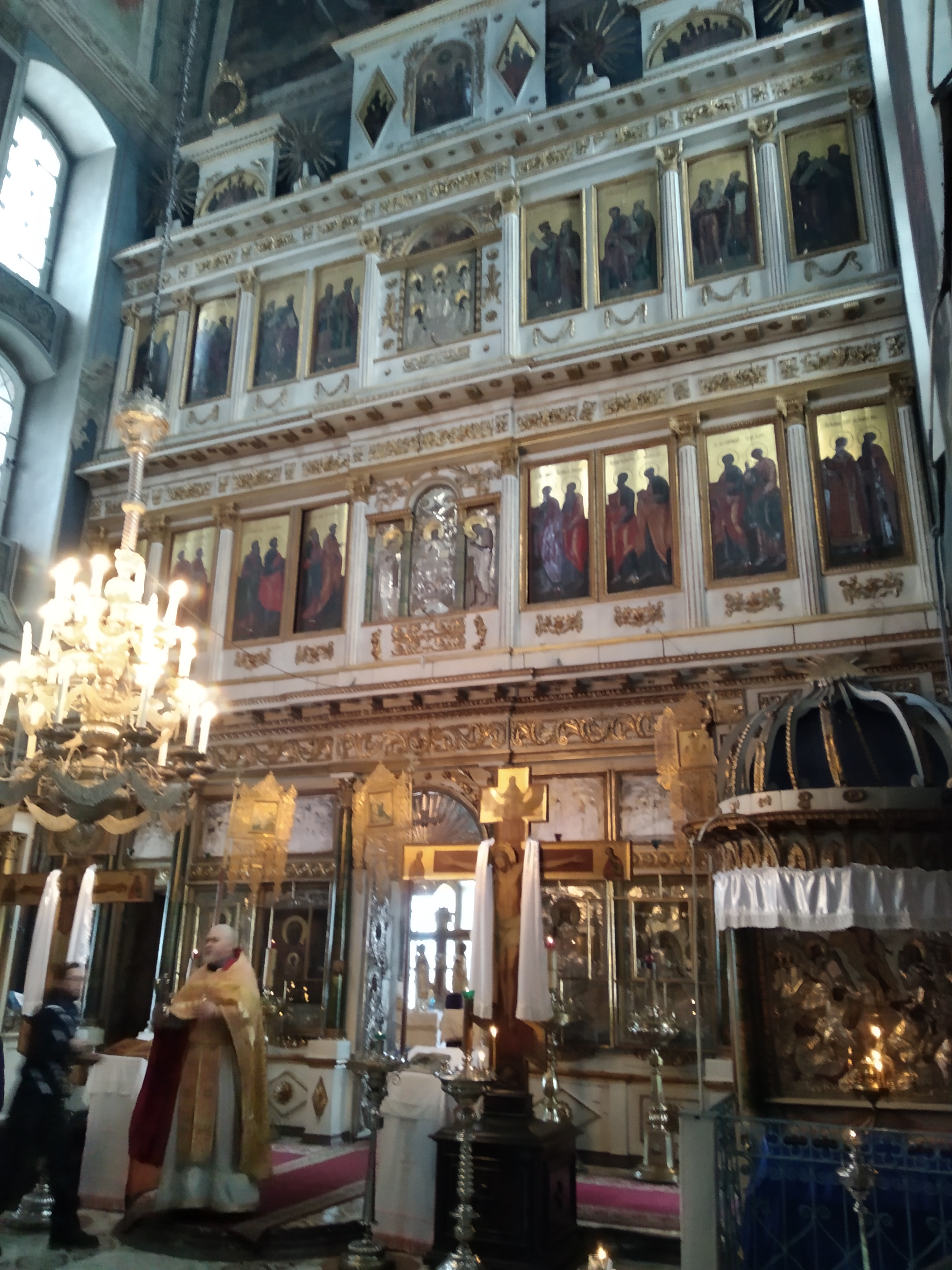 Свято-Знаменская церковь: улица Центральная, 3, Красное, Палехский район, Ивановская область